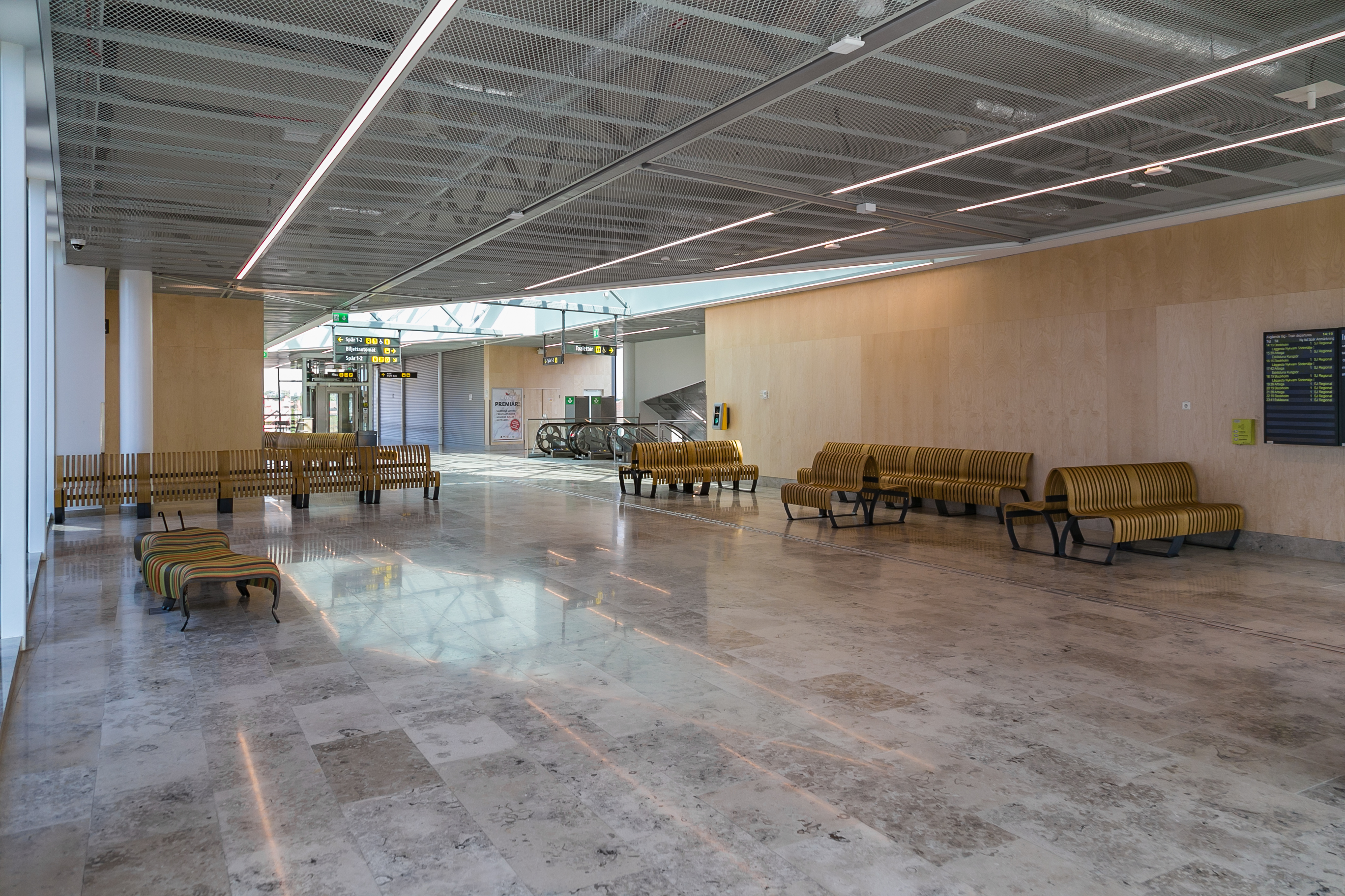 Strängnäs resecentrum, Strängnäs, Södermanlands län, Sverige.